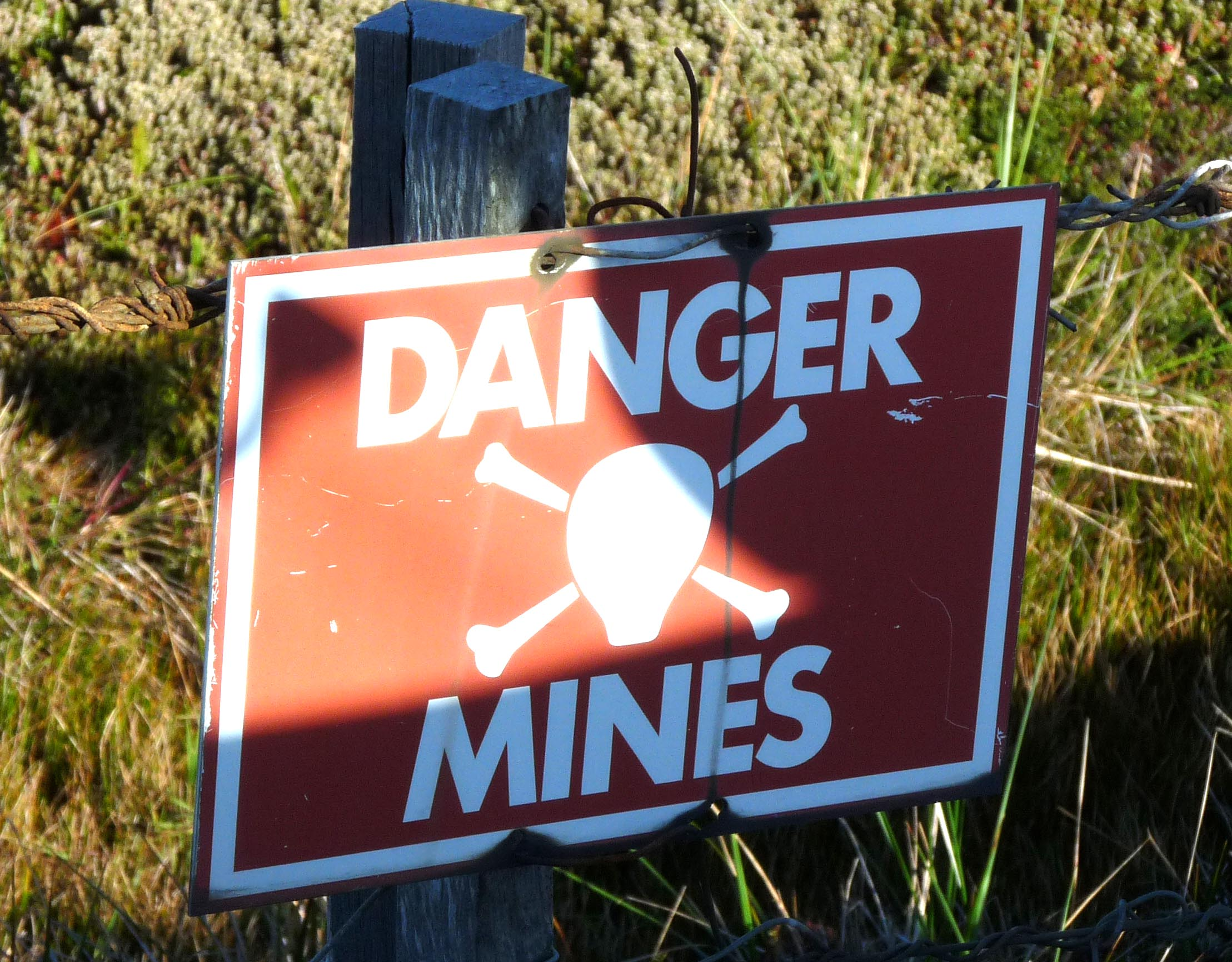 Mines - Copie (2)